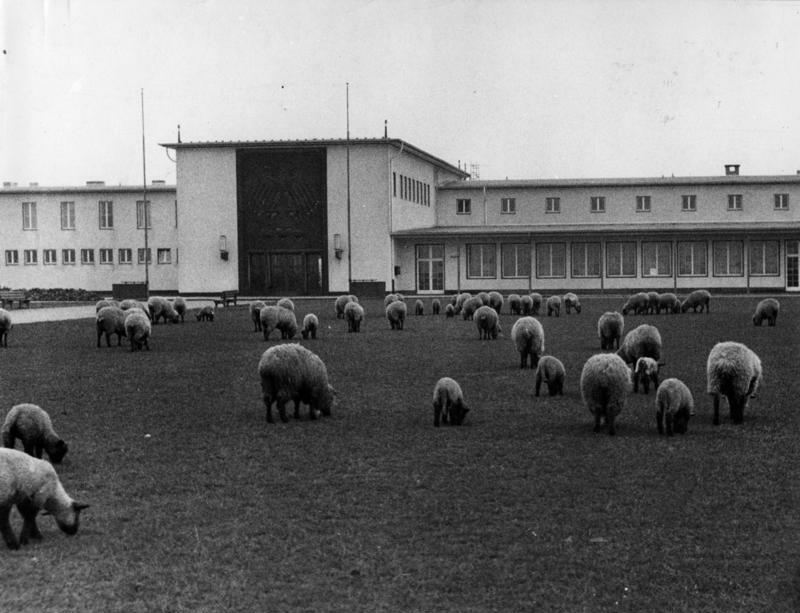 Köln, Flughafen, Haupteingang Kölner Flughafen. Haupteingang 3838/37 [Köln.- Haupteingang des Flughafens, im Vordergrund Wiese mit Schafen]